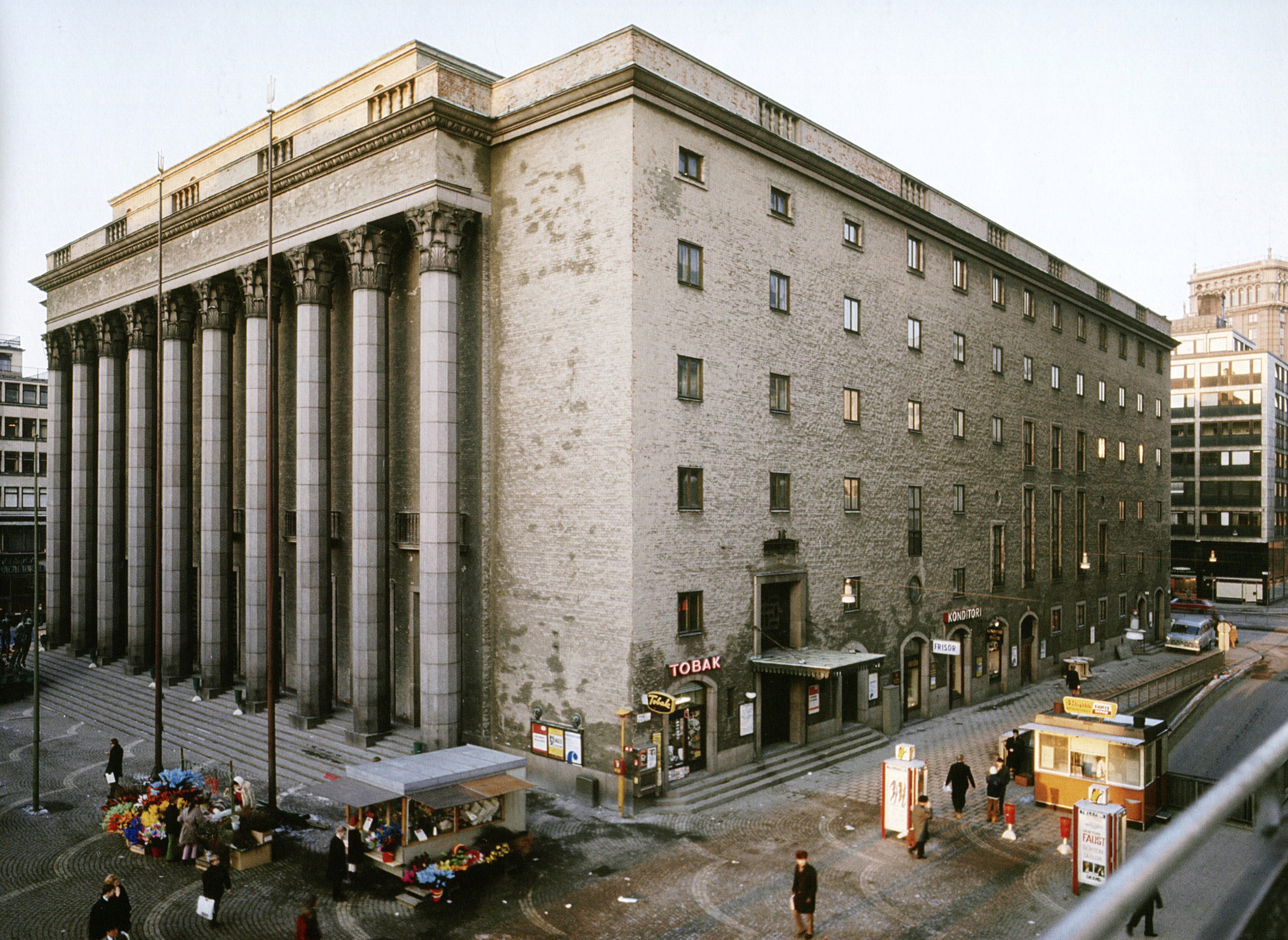 Stockholms konserthus